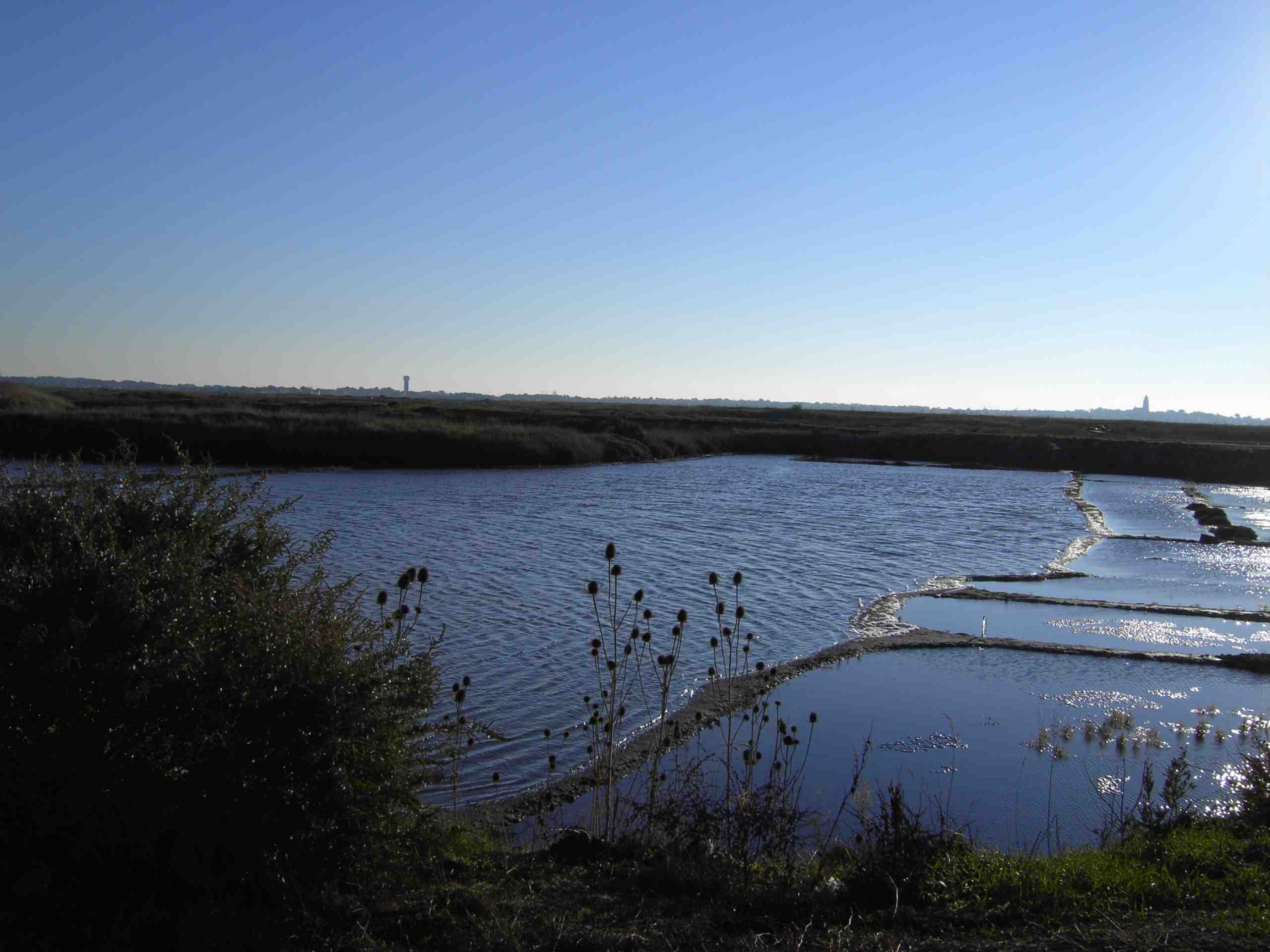 Salzgewinnung auf der Halbinsel Guérande. Fotograf: Bernd Reichelt. Aufnahme: November 2005.